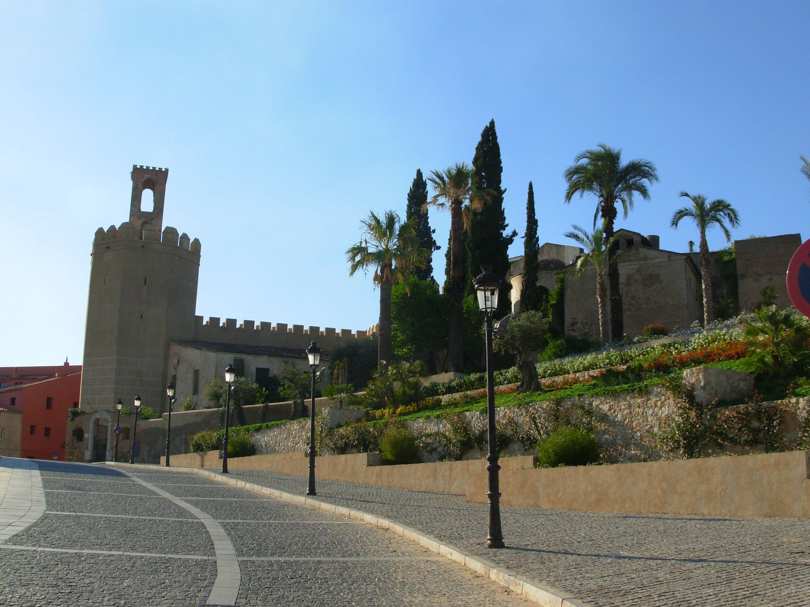 La Galera y Jardines de La Galera, en Badajoz